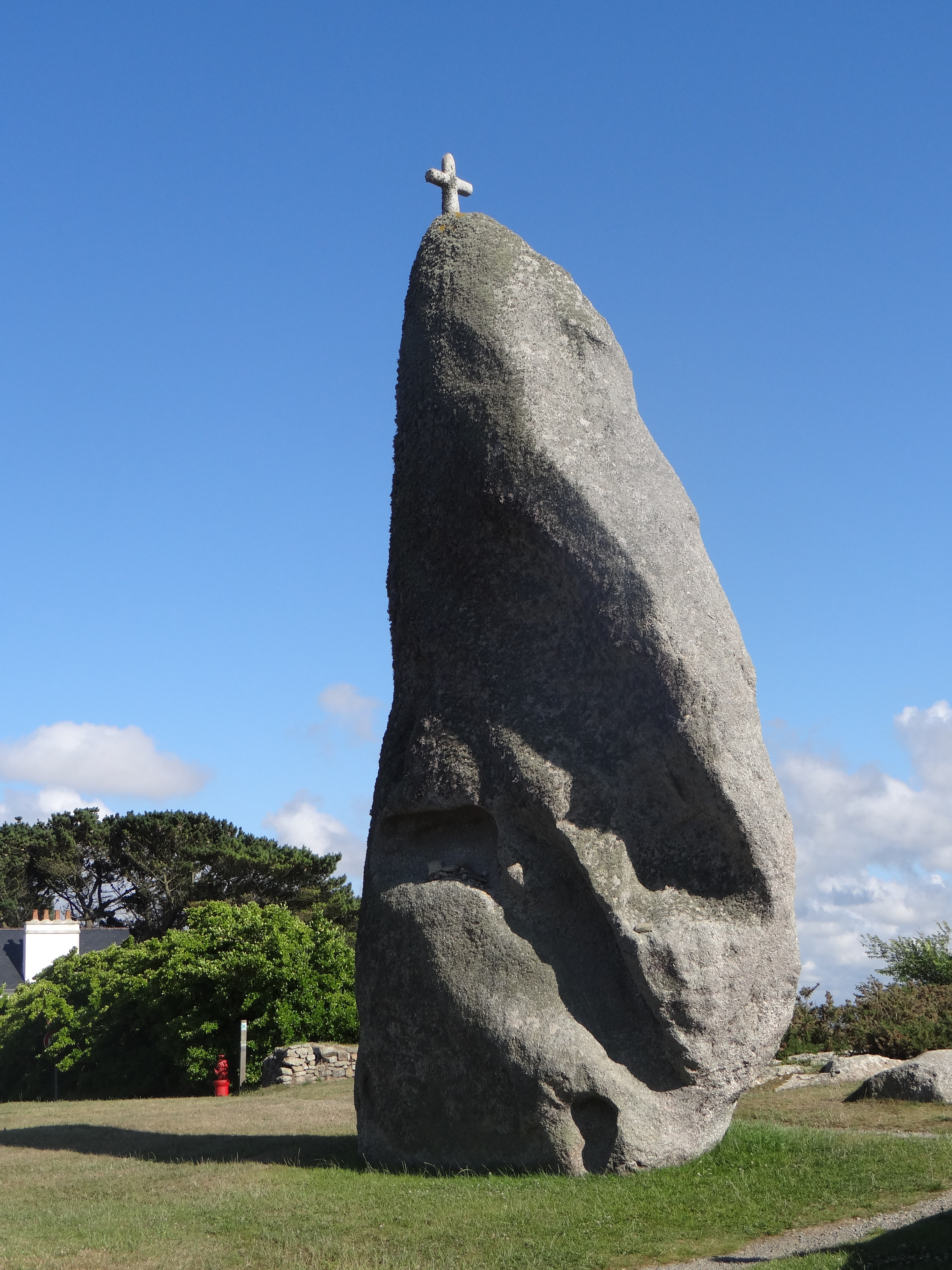 Le menhir de Men Marz, Brignogan-Plages, Finistère, France.